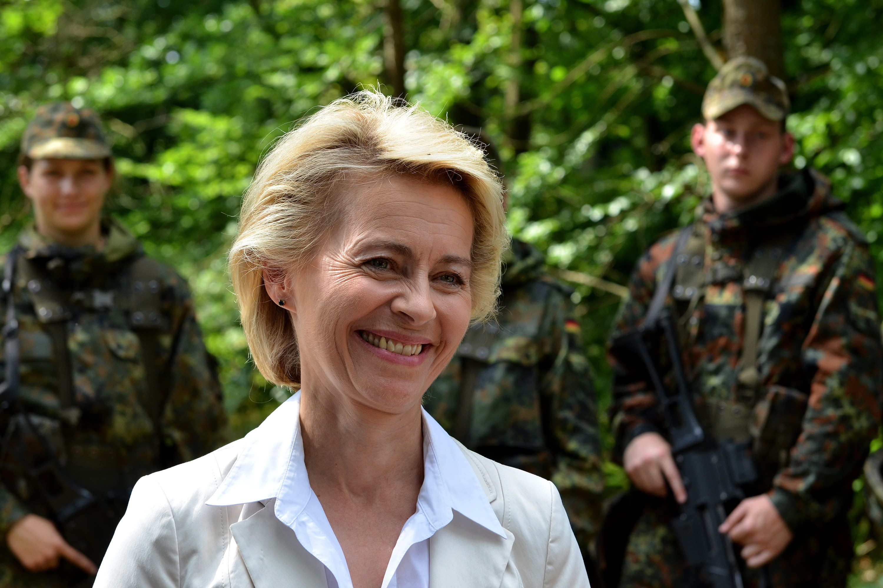 Augustdorf: Bundesverteidigungsministerin Ursula von der Leyen (CDU) während ihrer Sommerreise 2014 in der Generalfeldmarschall-Rommel-Kaserne